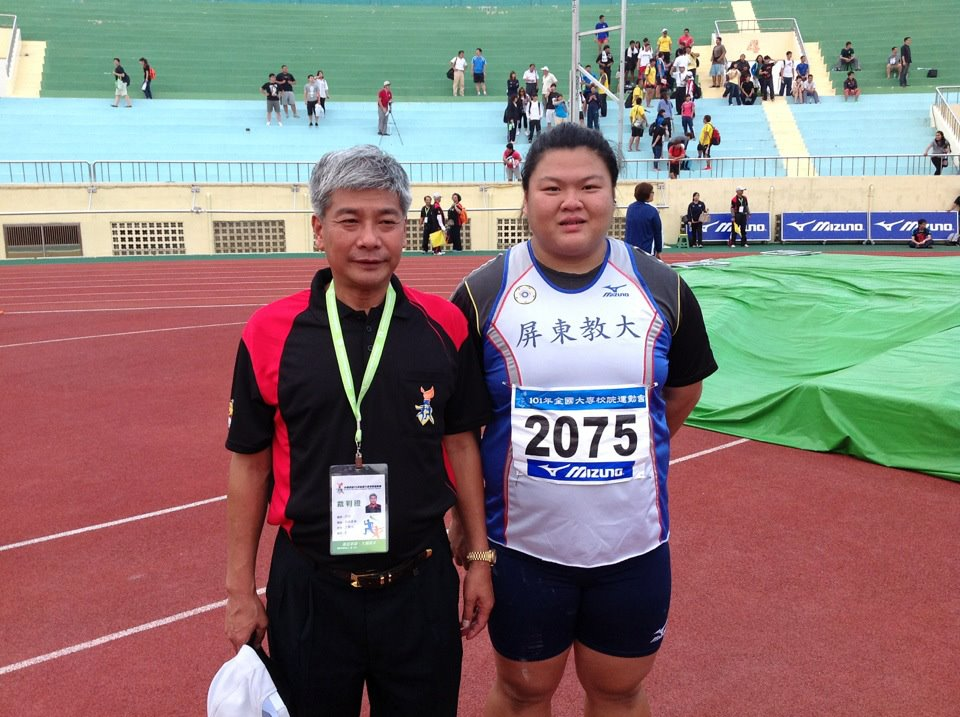 李文華與中華民國田徑協會秘書長王景成在2012全大運賽後合影